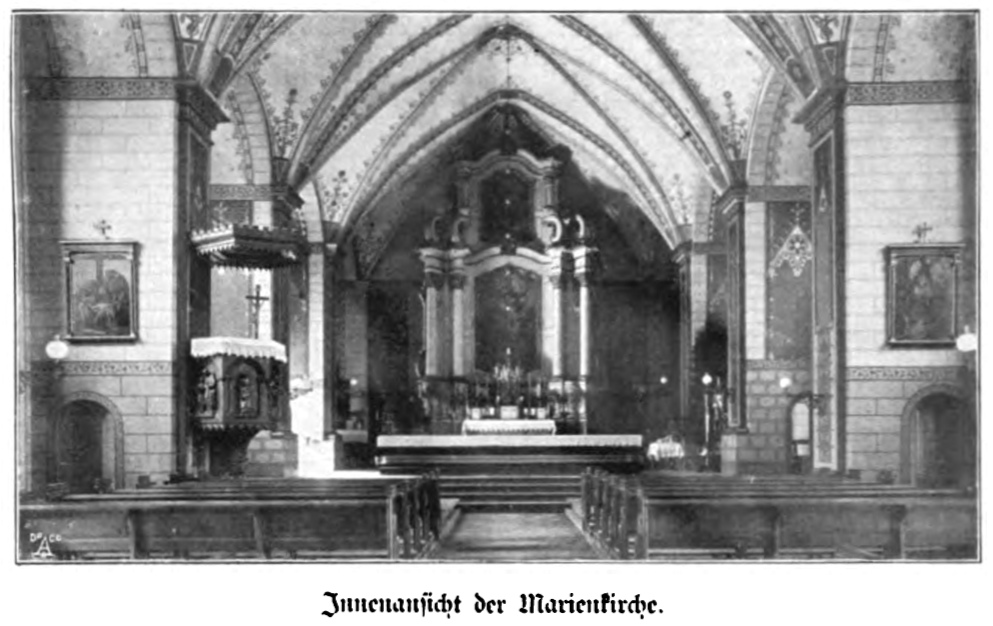 Marienkirche in Siegen/Westfalen: Innenansicht. Fotografie von Albert Ludorff, 1903